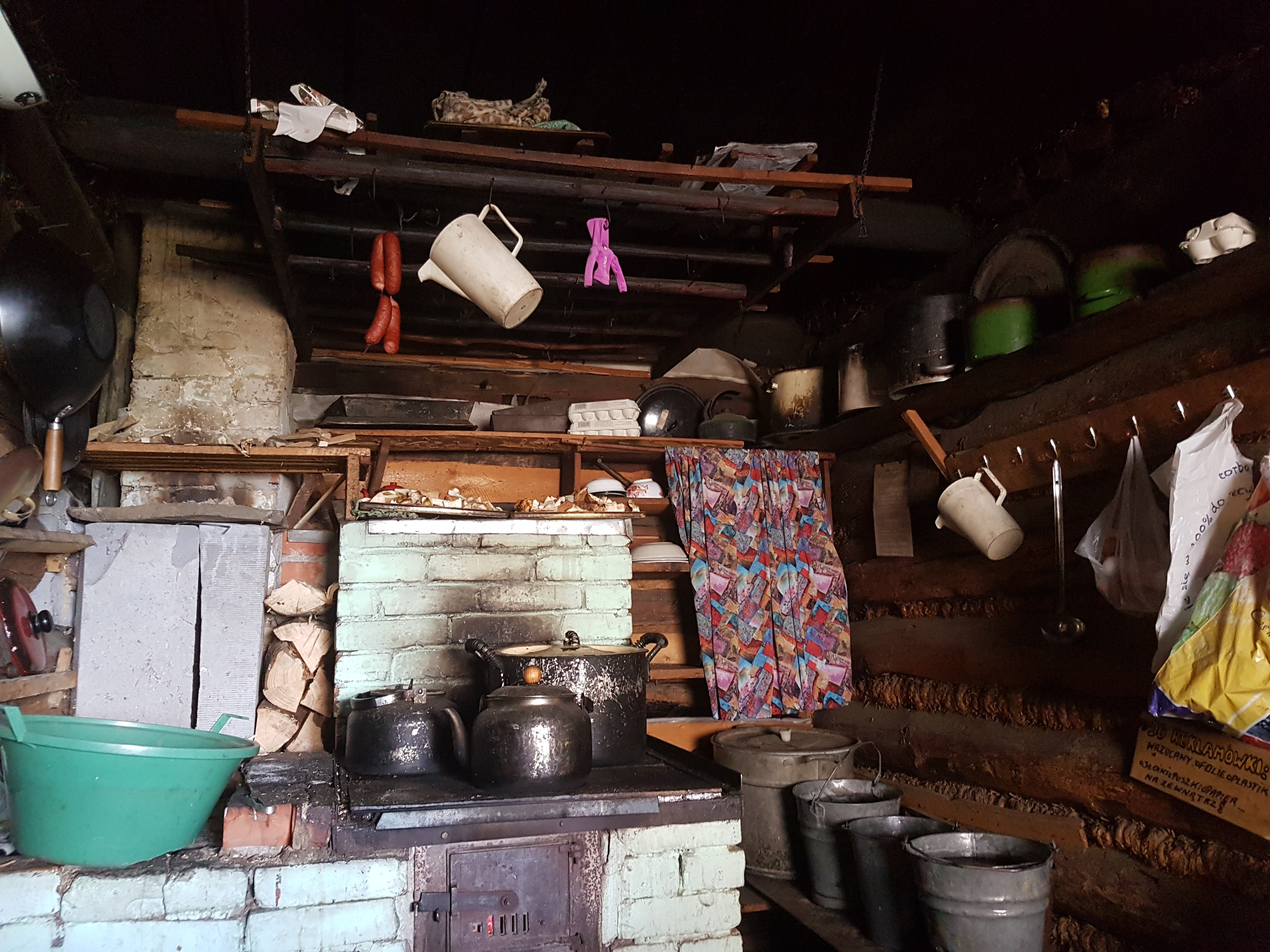 Kuchnia w studenckiej Chatce pod Niemcową